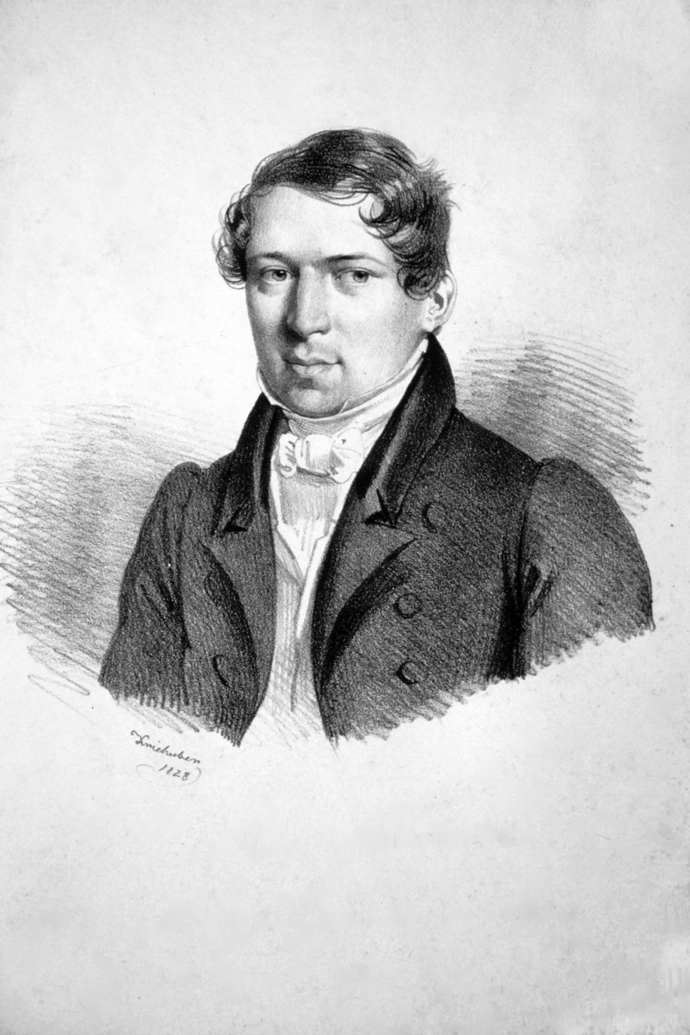 Peter Wucherer Freiherr von Huldenfeld (1806-2877), Hofrat, Kreishauptmann in Eger, Ehrenbürger von Eger und Franzensbad. Ritter des Leopoldordens. Lithographie von Josef Kriehuber, 1829, als Zögling des Theresianums.